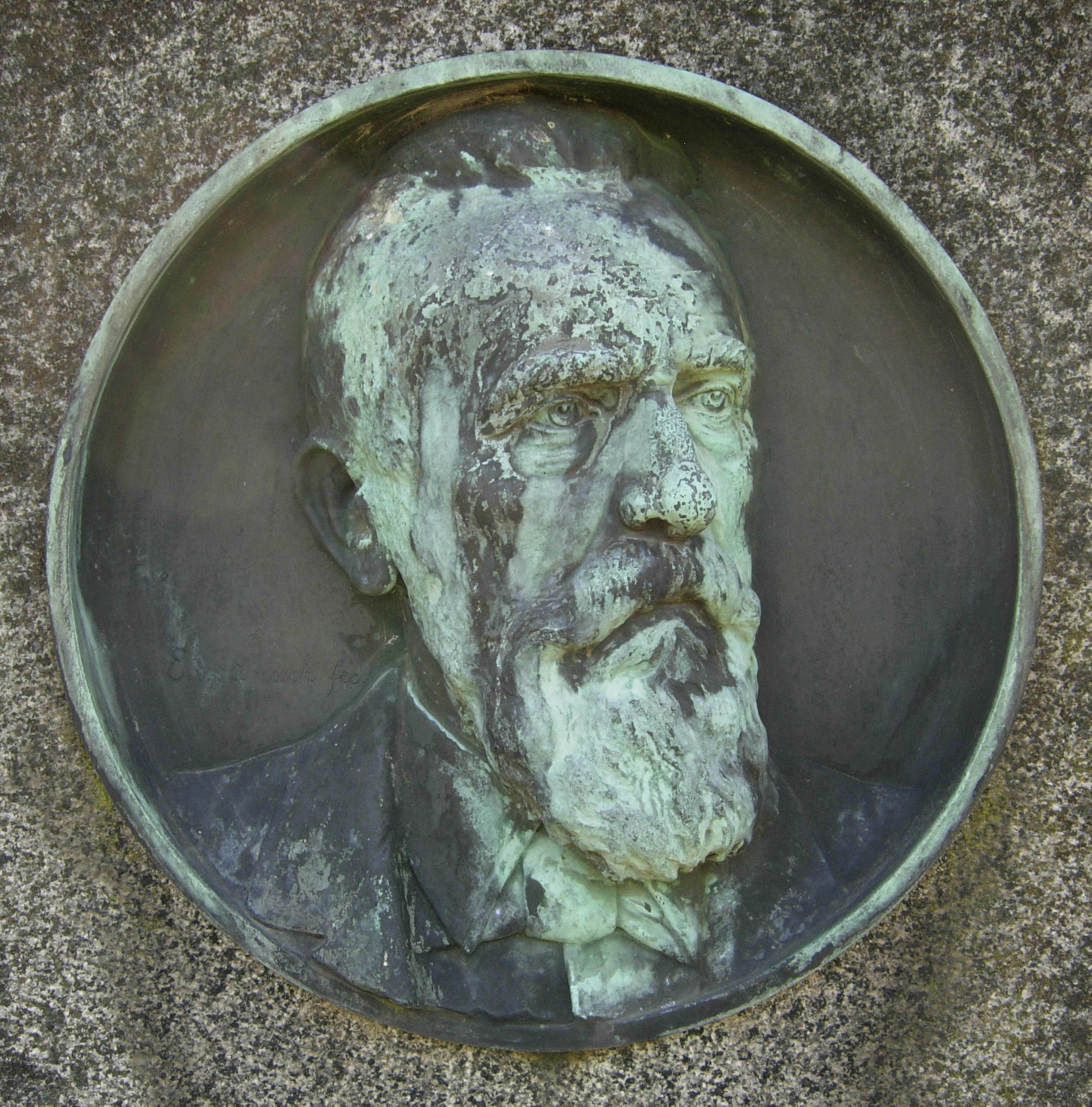 Erich von den Driesch (* 12. September 1878 in Herzogenrath, † ?): Bronze-Medaillon für seinen Vater Carl Anton Hubert von den Driesch, Regierungsrat, Träger des Roten Adlerordens IV.Klasse, (* 10.7.1830 Heinsberg, † 16.9.1900 Poppelsdorf) auf dem Poppelsdorfer Friedhof in Bonn; die Lebensdaten auf dem Grabstein sind ohne Hilfsmittel nicht mehr zu entziffern; Der Bildhauer Erich von den Driesch, ein Schüler von Albert Küppers, war in Aachen, Düsseldorf und Bonn tätig; Quelle: Allgemeines Künstler-Lexikon, 6. Band (2. Nachtrag mit Berichtigungen), Hrsg: Hans Wolfgang Singer, Literarische Anstalt Rütten & Loening, Frankfurt / Main 1922